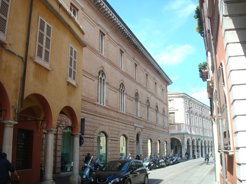 Cesena (Italie), Palazzo de la caisse d'épargne, faàade avant